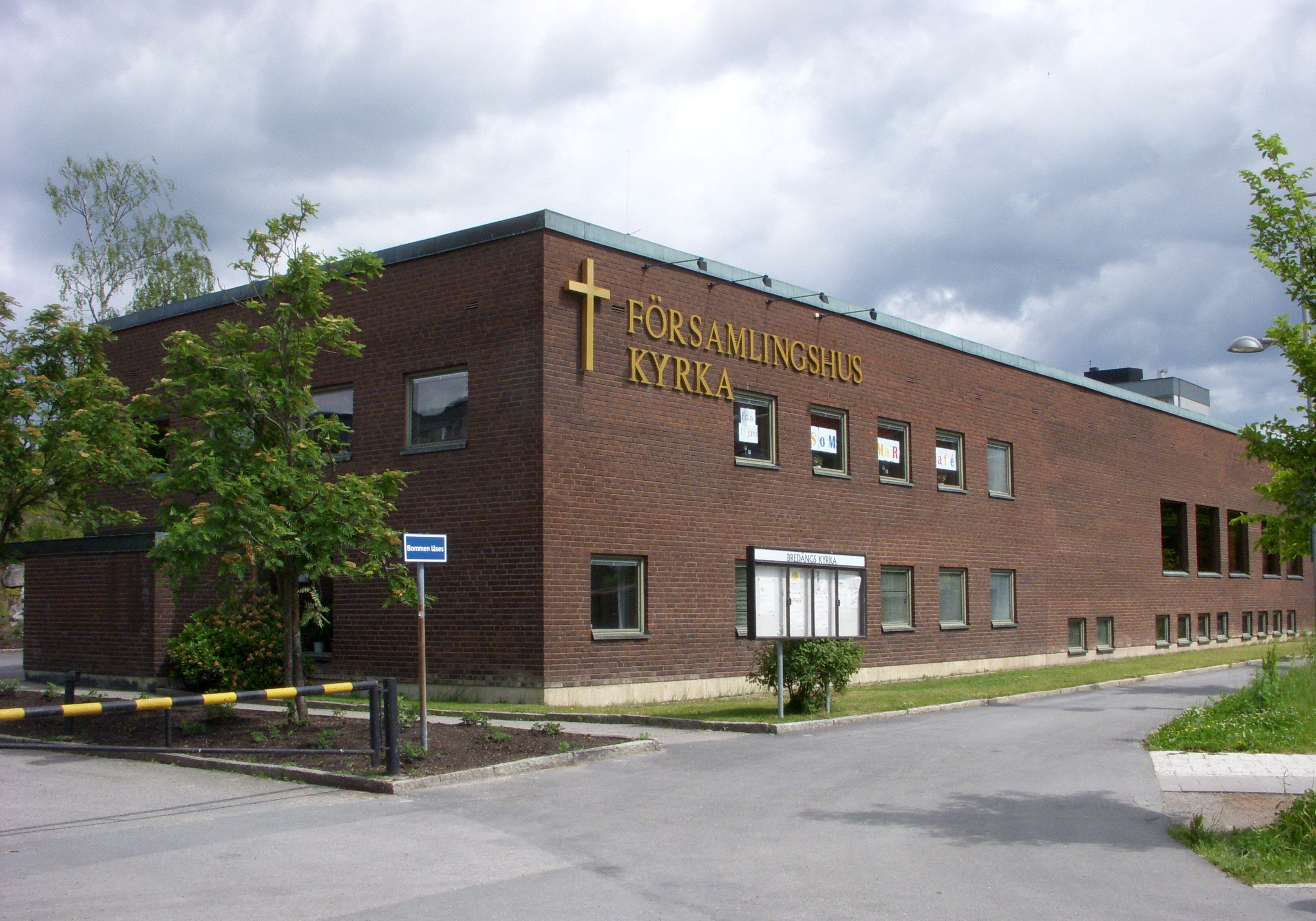 Bredängs kyrka och församlingshus